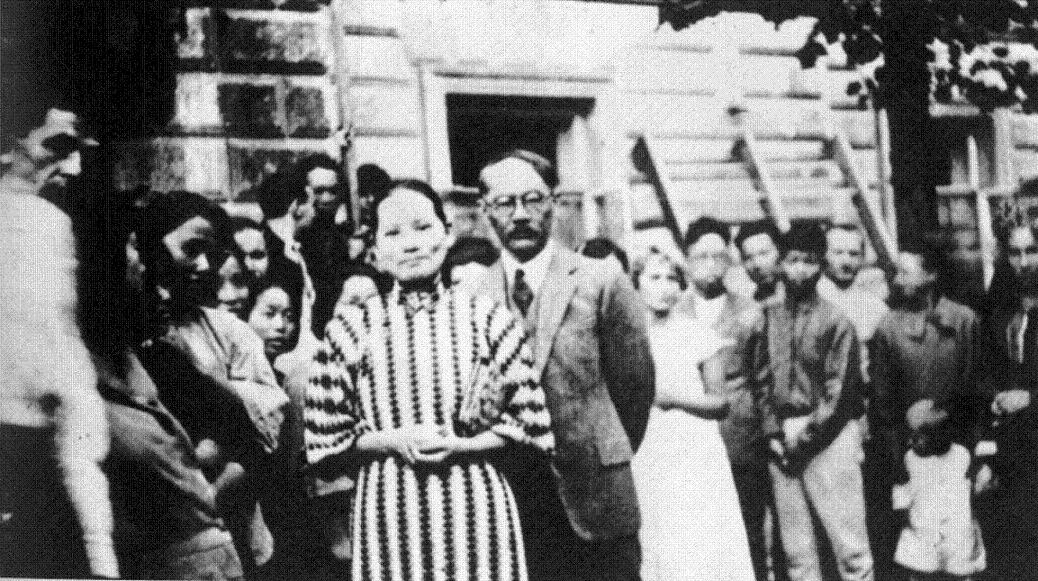 1927年宋庆龄陈友仁在莫斯科